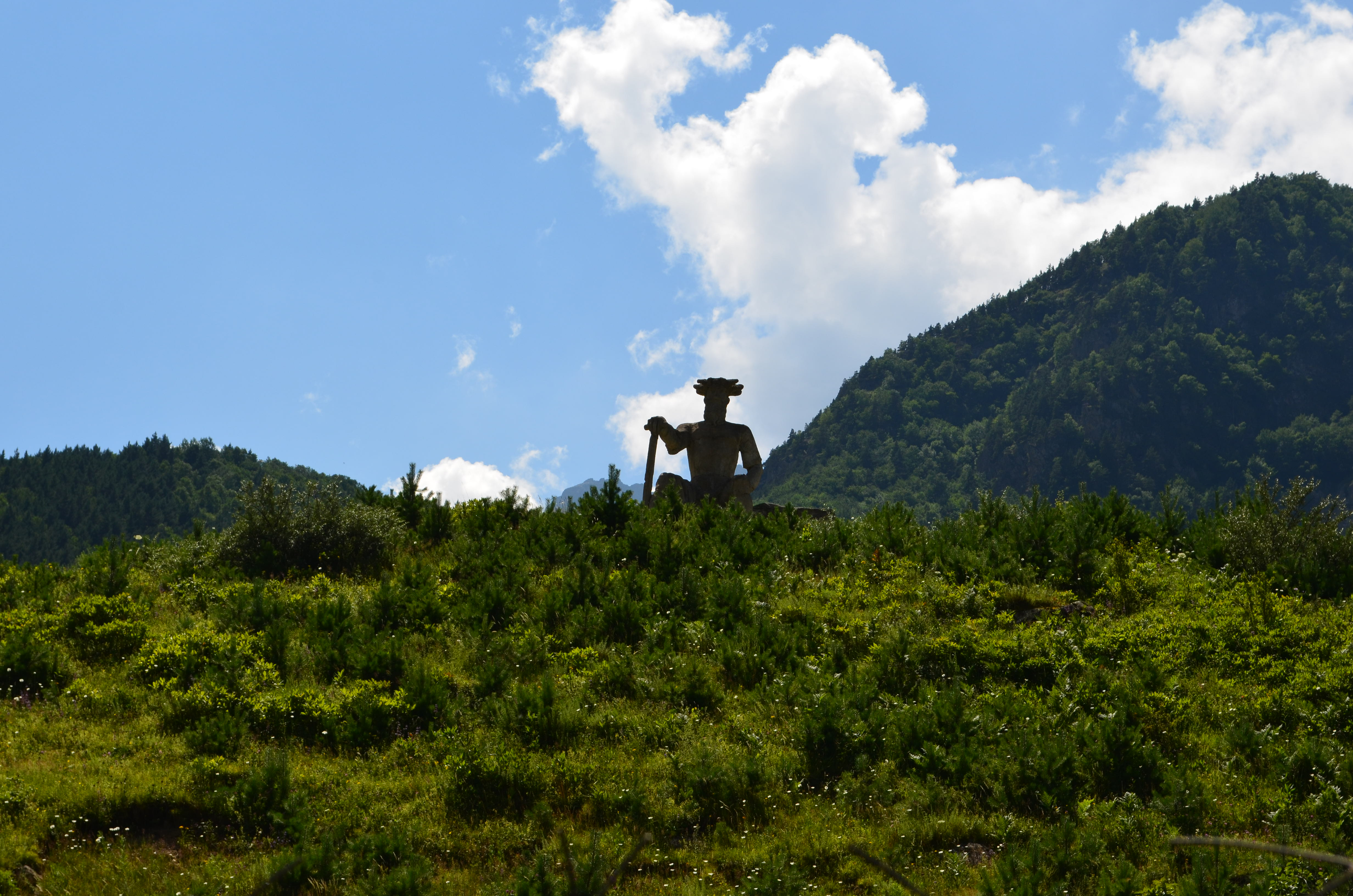 Афсати-божество диких зверей, покровитель охотников